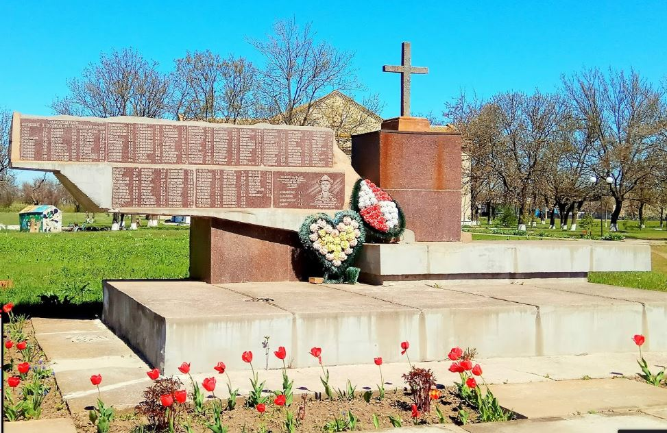 Пам'ятний знак в с. Першопокровка.